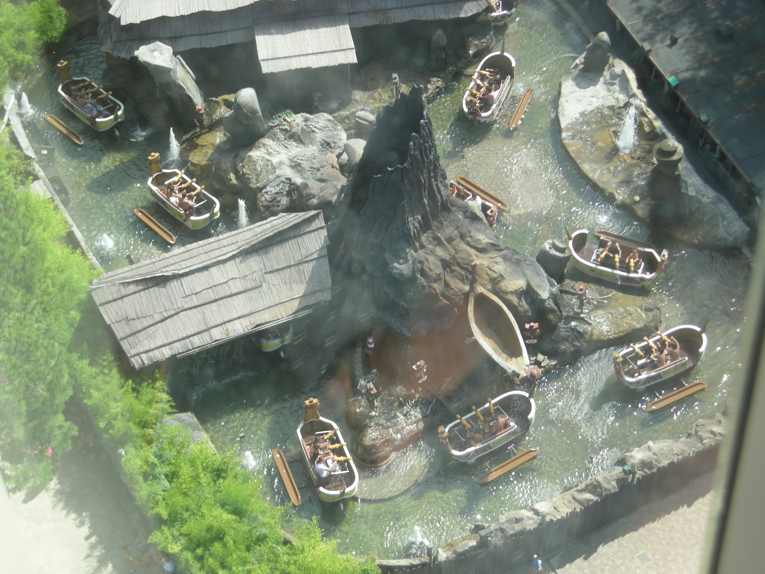 Visuale dell'attrazione "Raratonga".